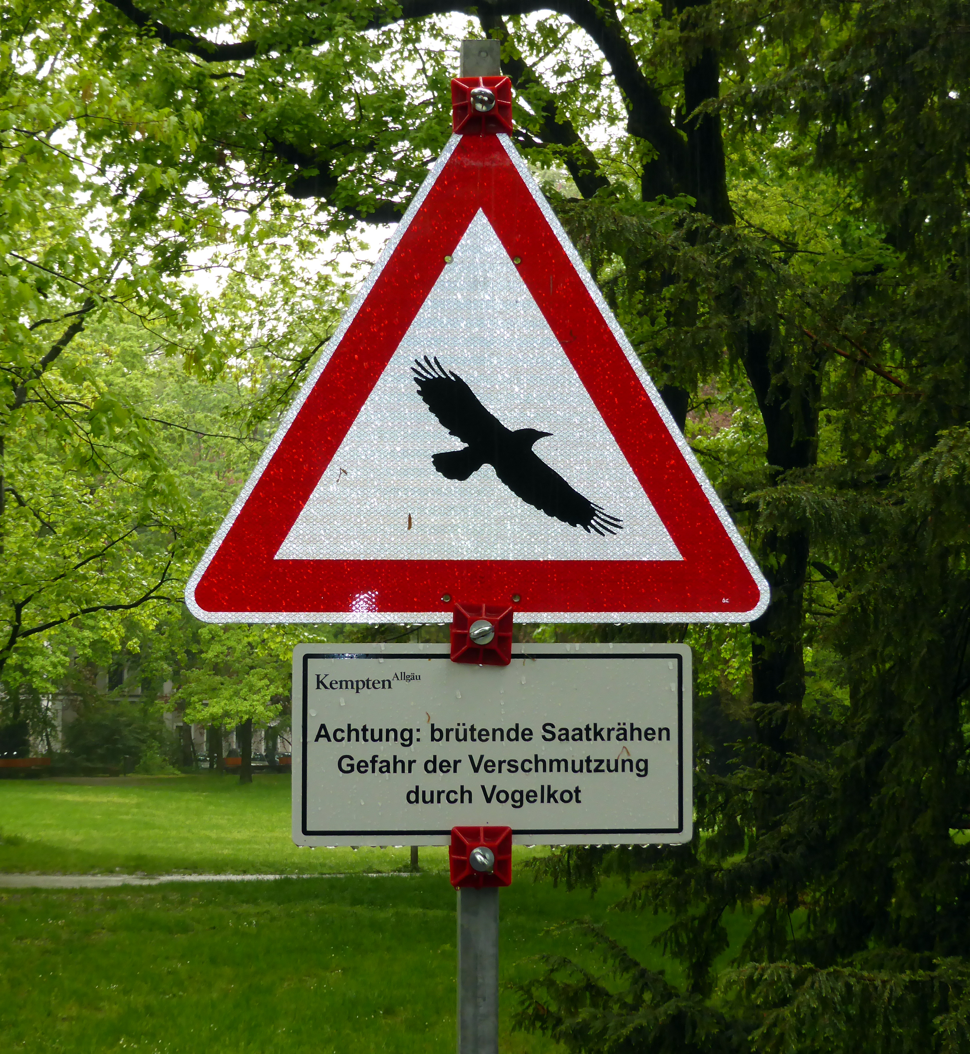 Saatkrähen Warnschild. Wikipedia:Süddeutschland-Treffen im Mai 2016 in Kempten im Allgäu.